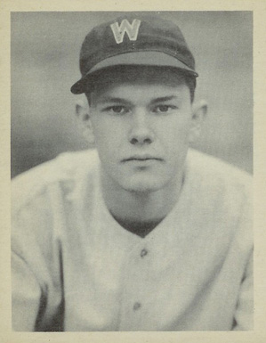 Buddy Lewis